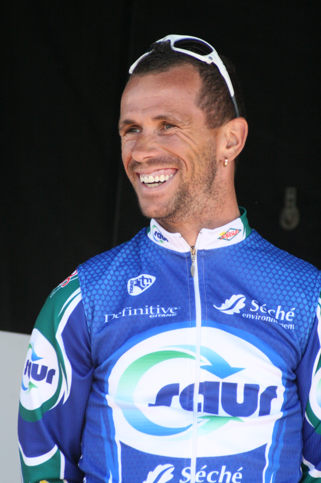 Jimmy Casper lors de la présentation des équipes des 4 jours de Dunkerque 2010